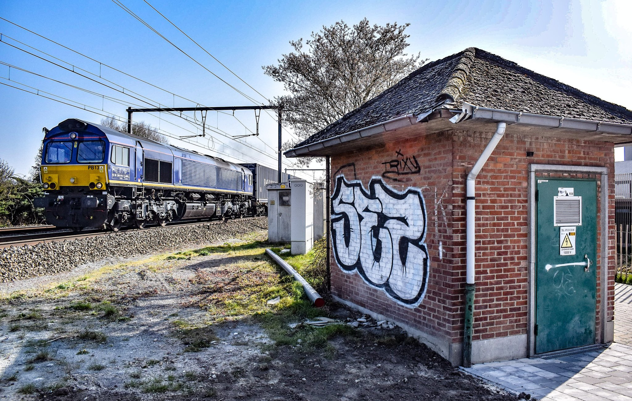 station